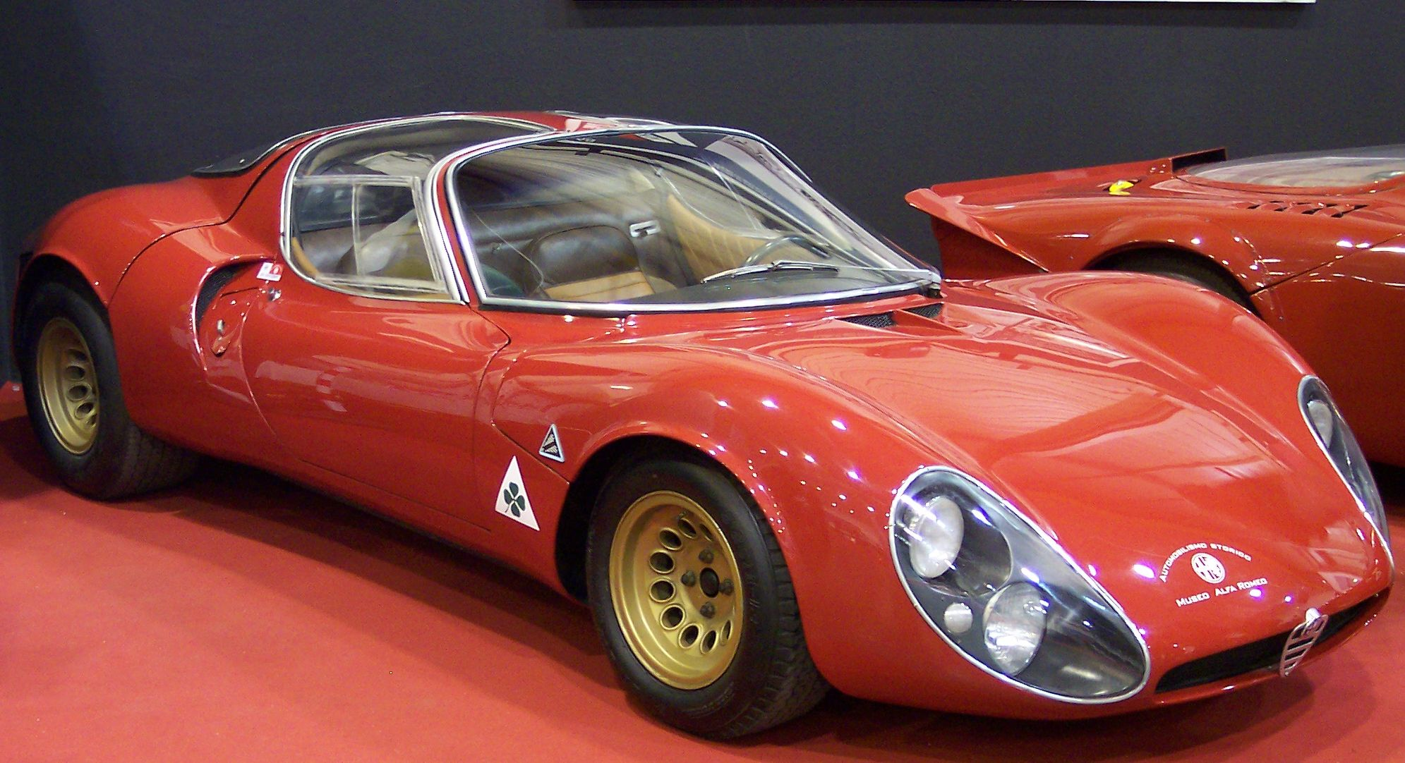 Alfa Romeo 33 Stradala Prototyp 1967